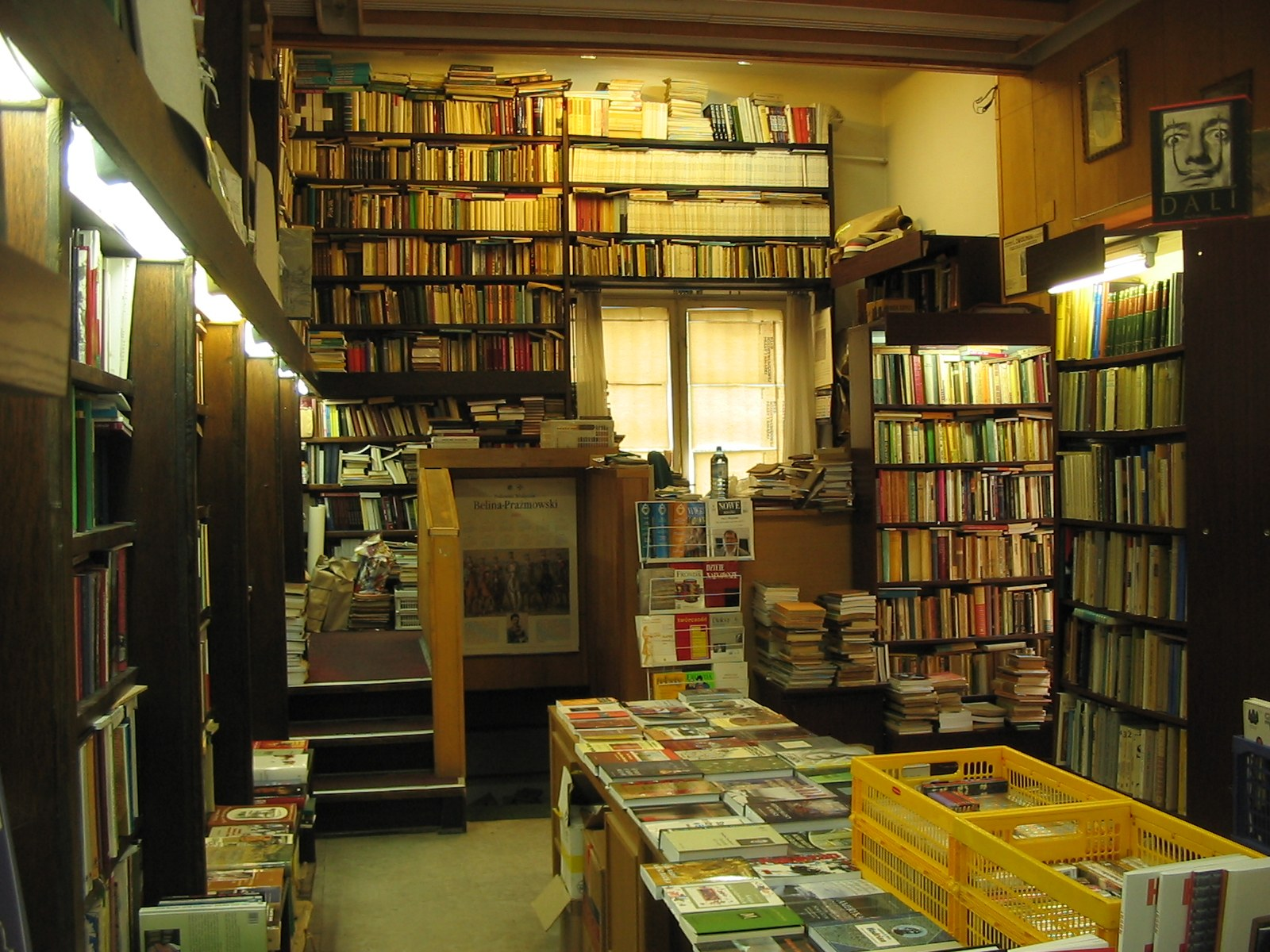 Antykwariat "Gryf" w Warszawie, ul. Dąbrowskiego